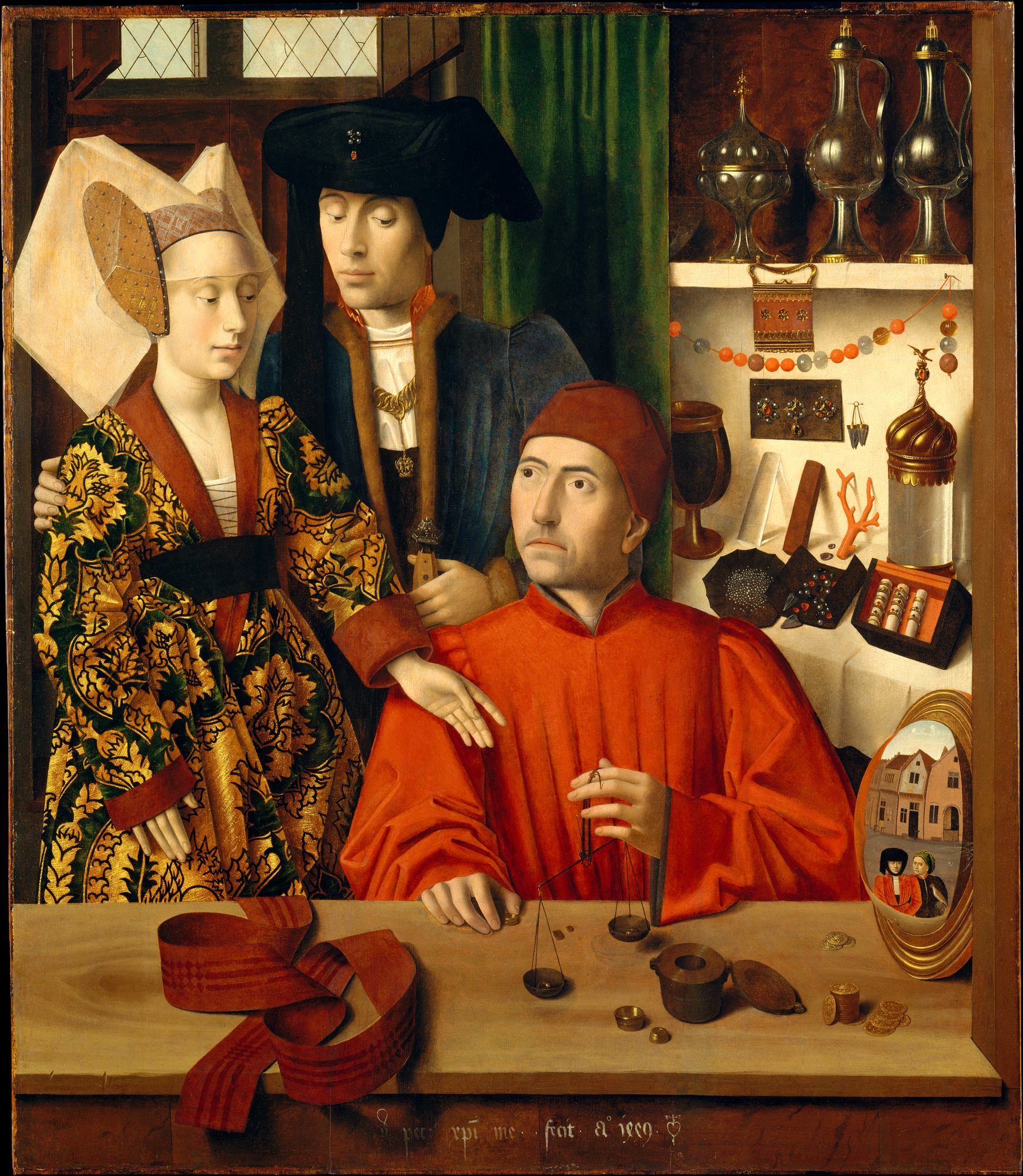 Saint Eloi Orfèvre (couple bourgeois chez un orfèvre)